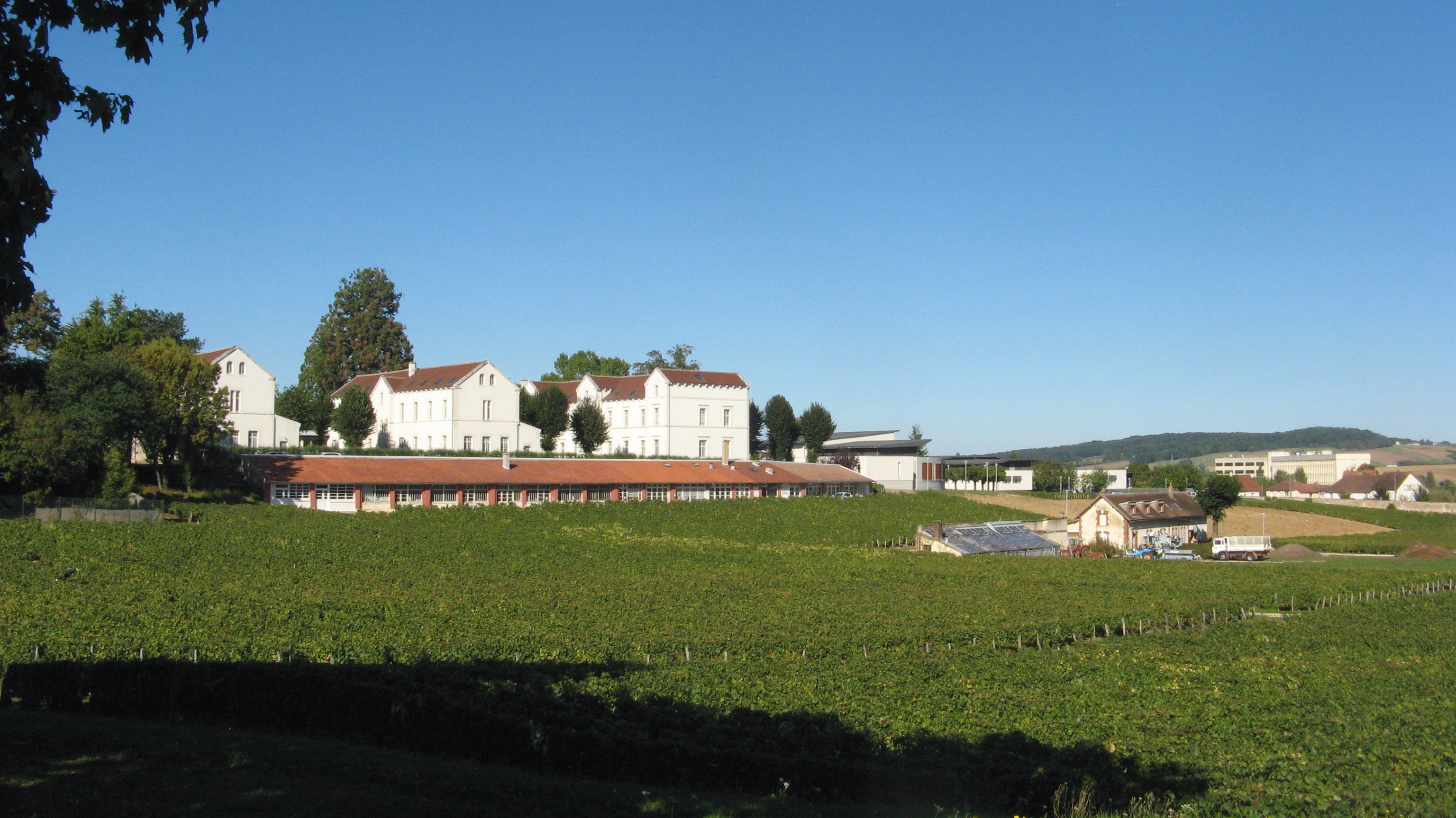 Auxerre : vigne du clos de la Chainette qui appartenait à l'ancien hôpital psychiatrique .